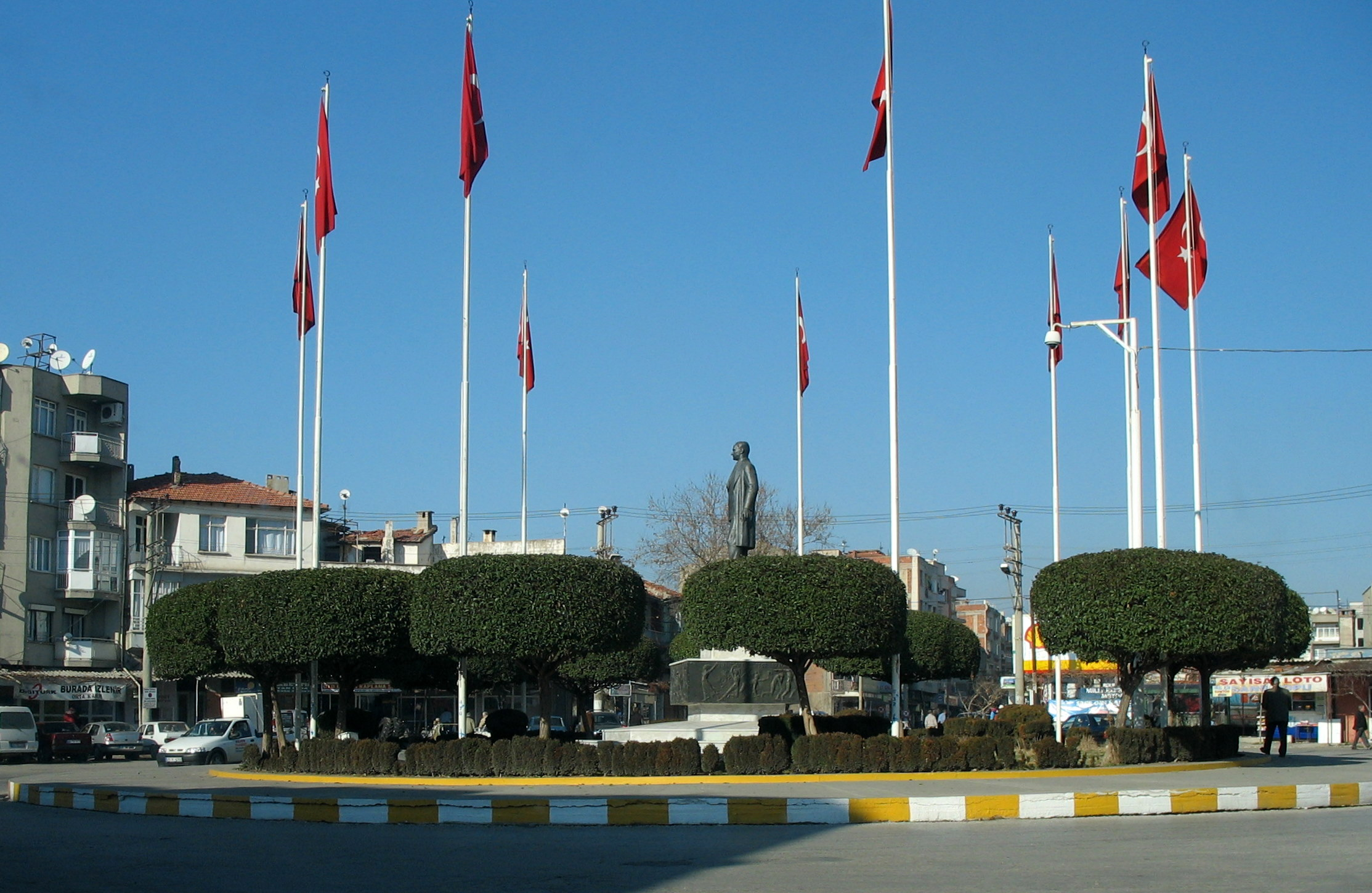 Akhisar, Manisa ilce merkezi